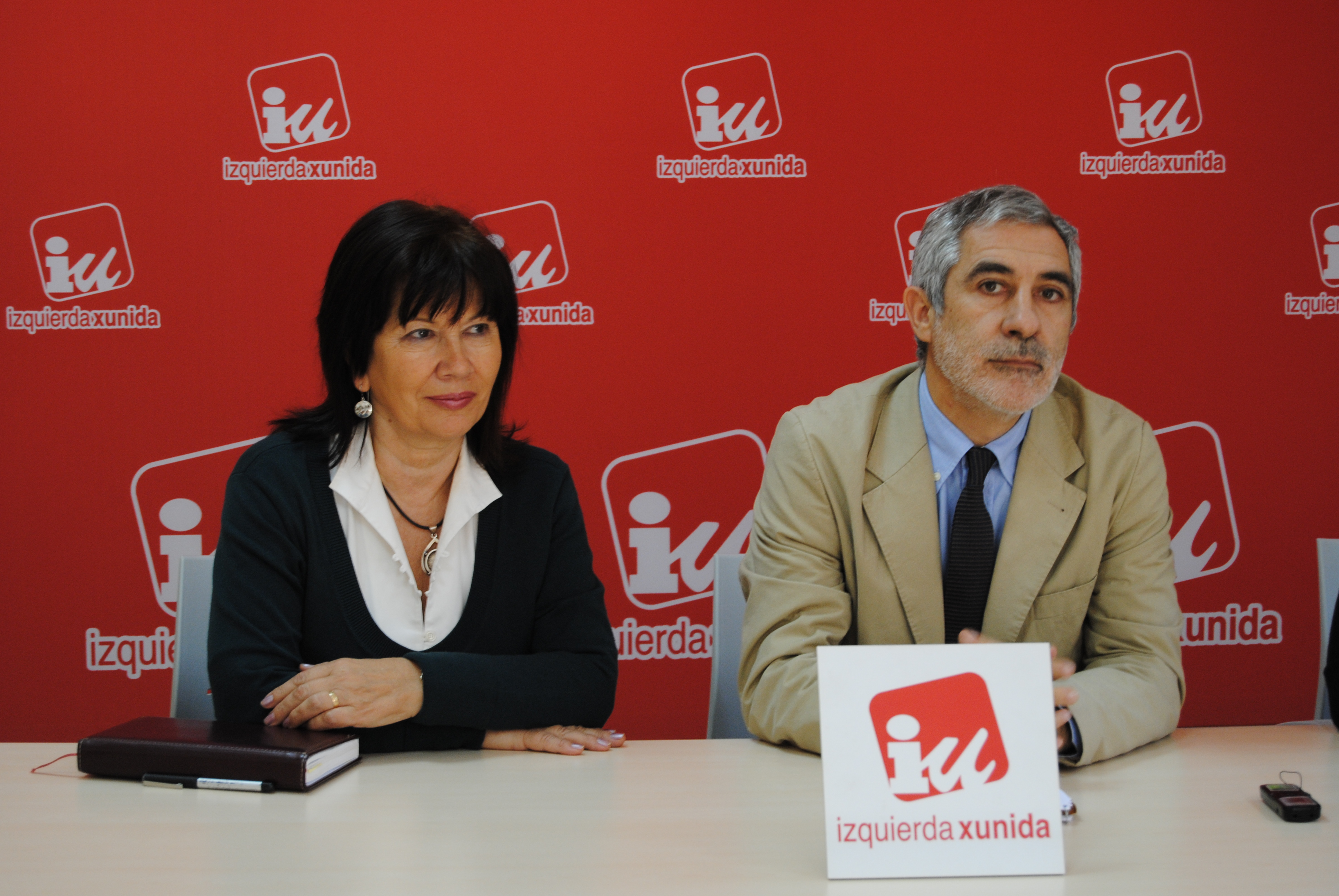 Esther García y Gaspar Llamazares, candidatos de IU de Asturias al Senado y el Congreso